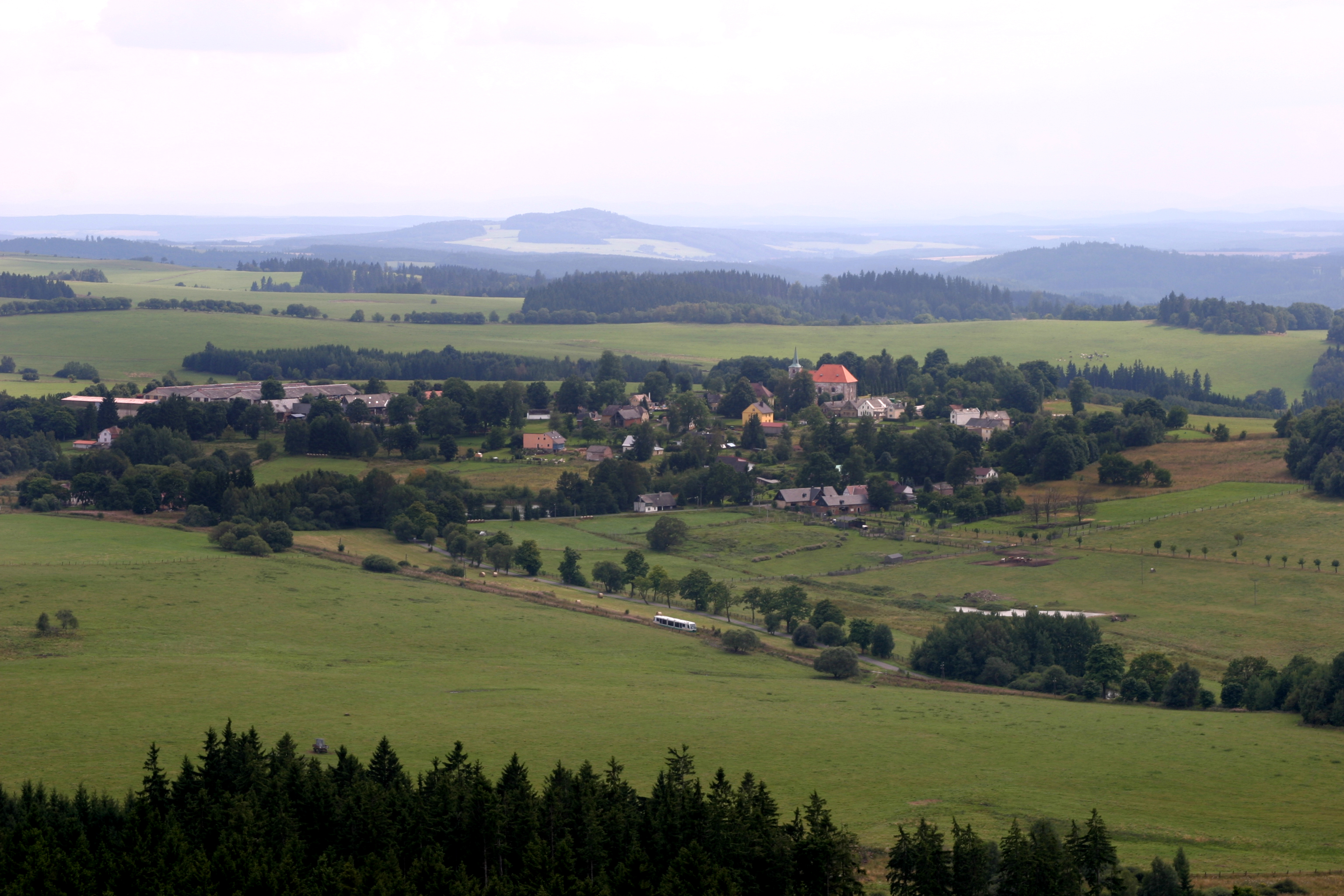 Habakladrau vom Podhorn-Berg aus fotografiert